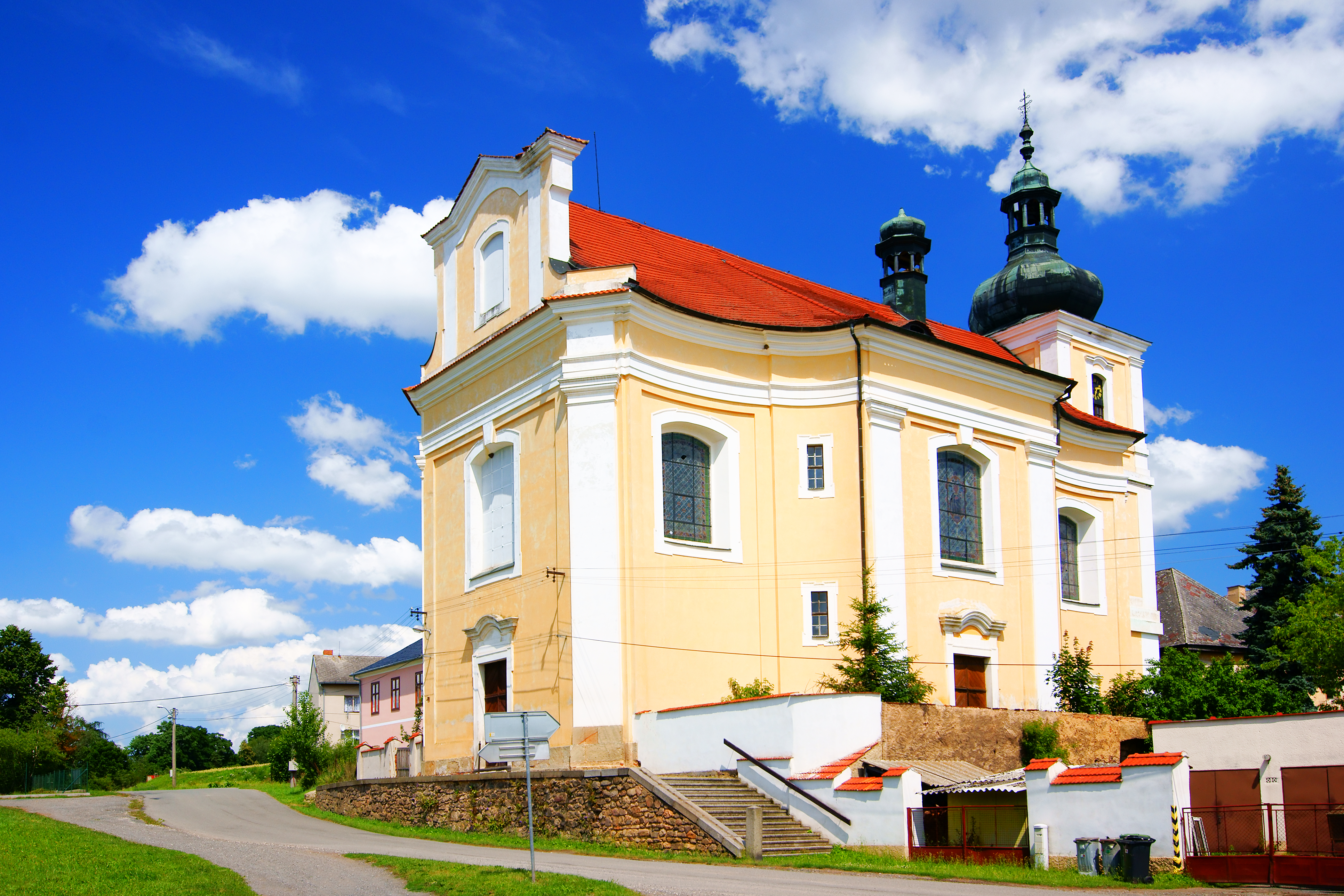 Barokní kostel sv. Václava v Žihli.